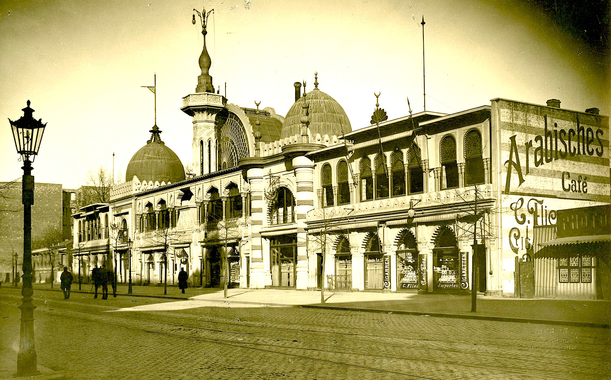 Арабское кафе, Дюссельдорф. Снесенный памятник архитектуры.